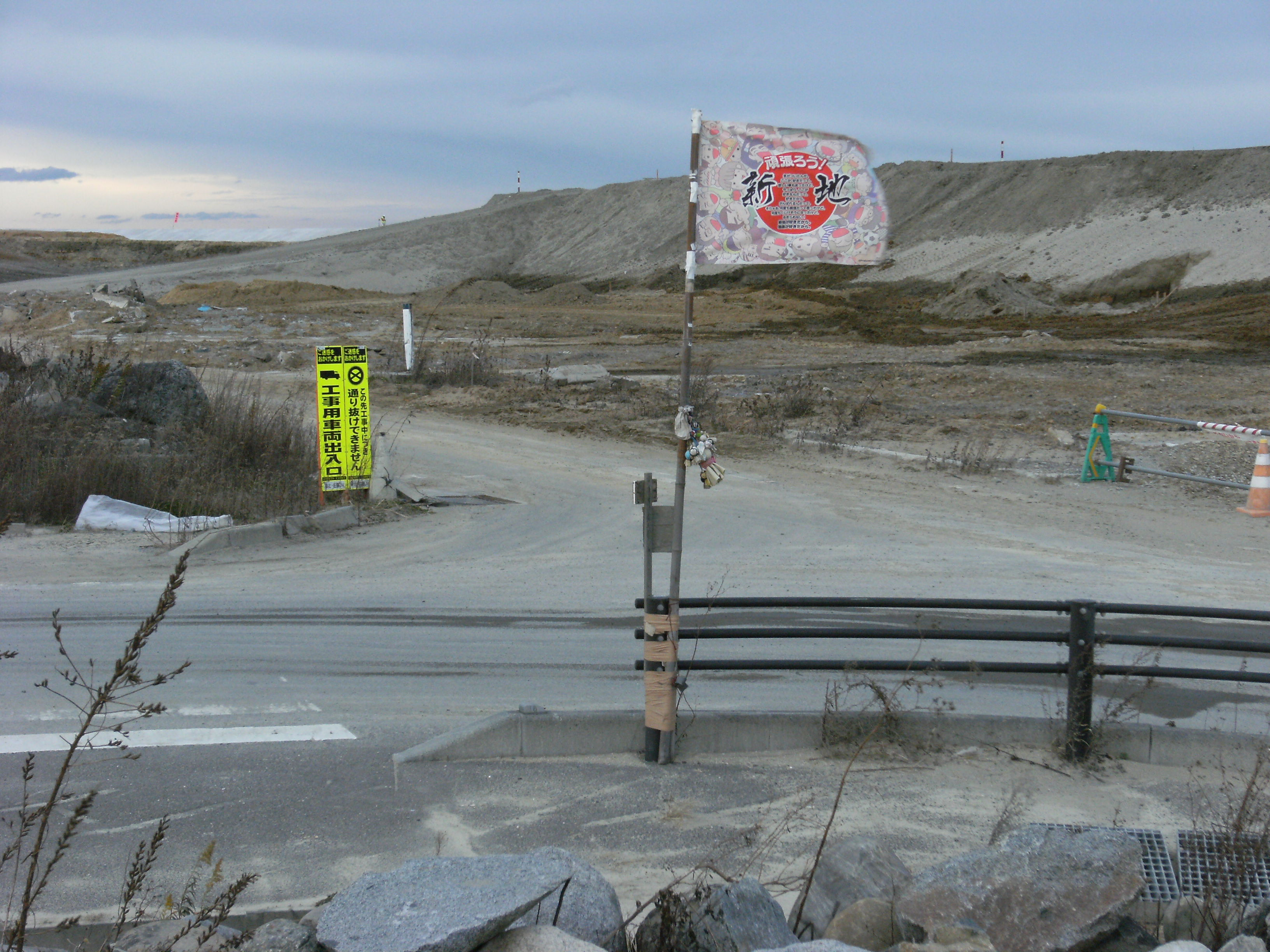 福島県新地町に立てられている復興祈願の旗